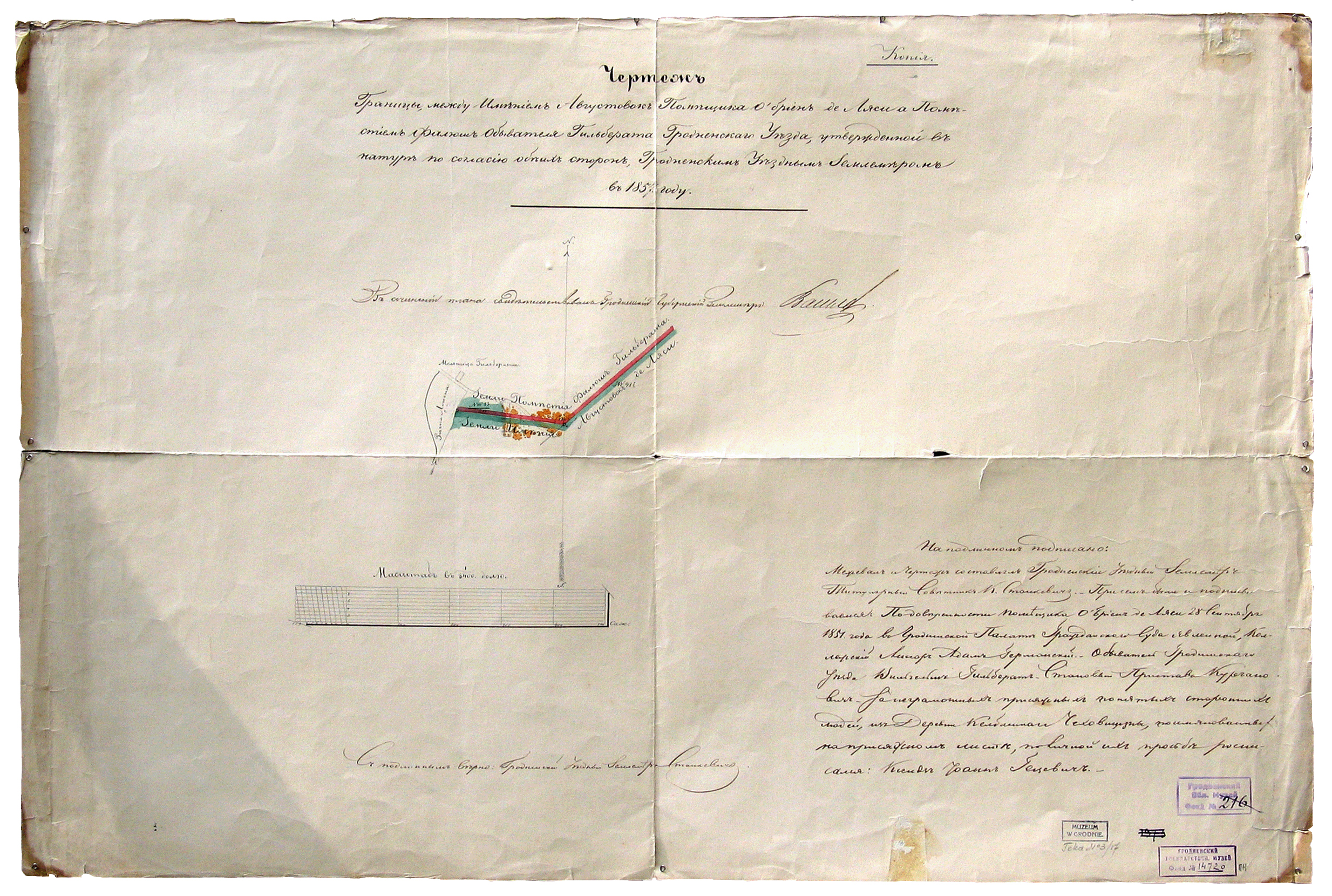 Беларуская (тарашкевіца): Горадня (Horadnia), Аўгустовак (Aŭgustovak). Плян